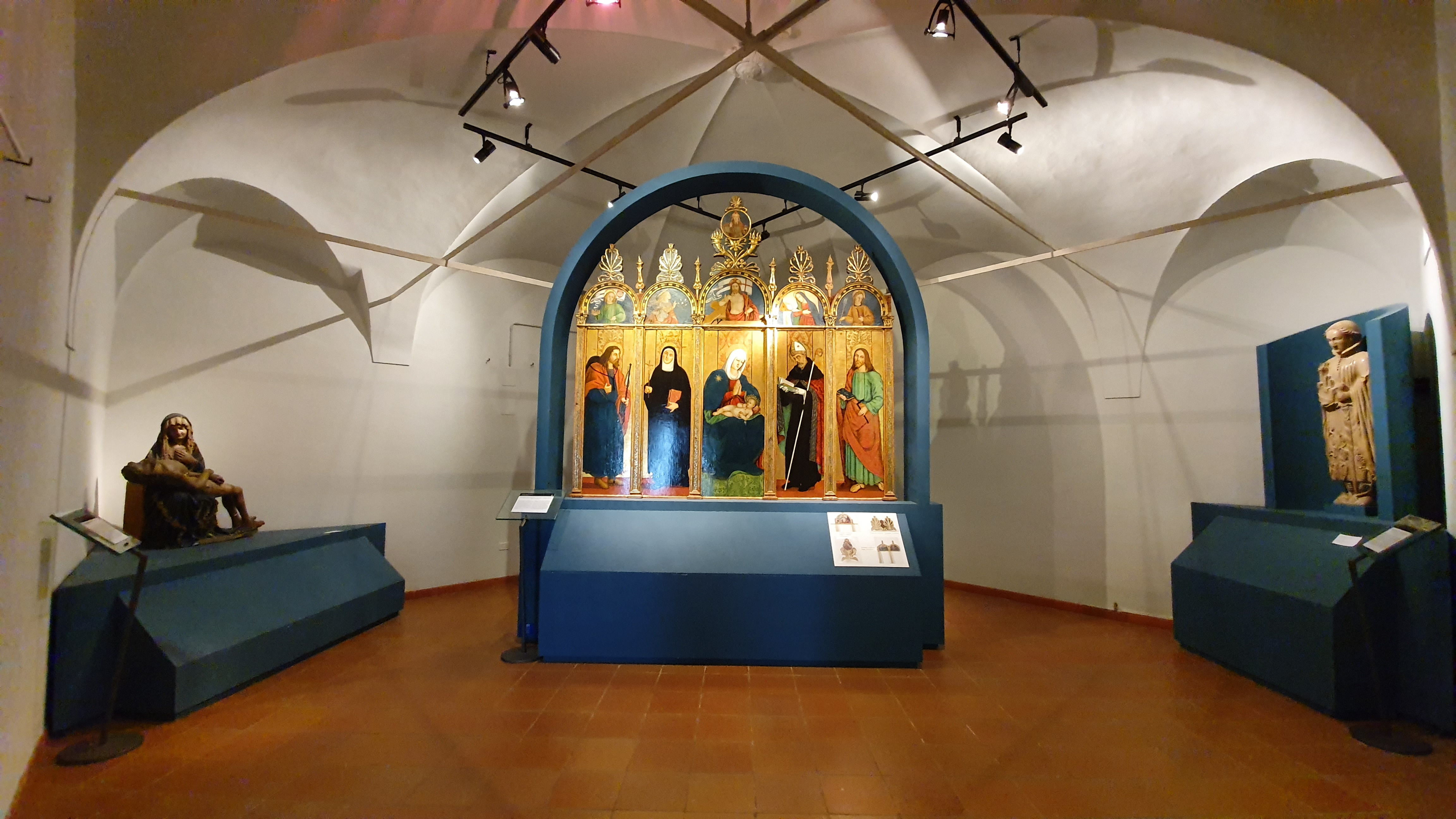 Da sinistra Versperbild in gesso policromo di scuola viennese-praghese, polittico di scuola marchigiana, statua in pietra di San Secondo di scuola umbra